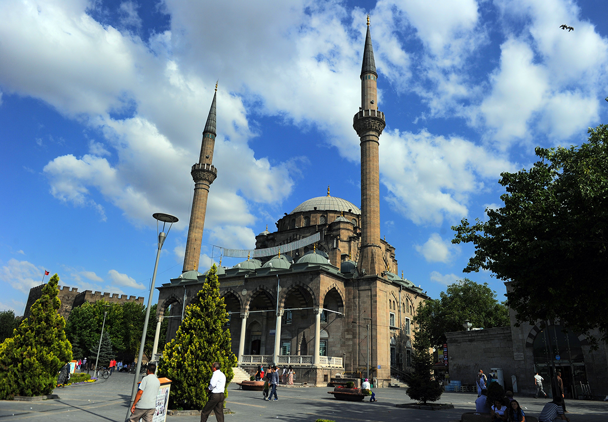 Bürüngüz Mosque in Kayseri, Turkey.